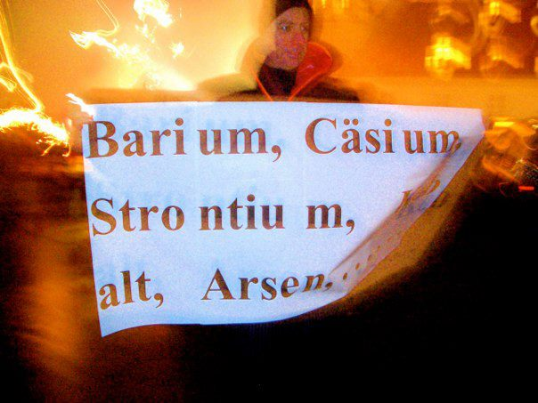 Sylvester Aktion 2014